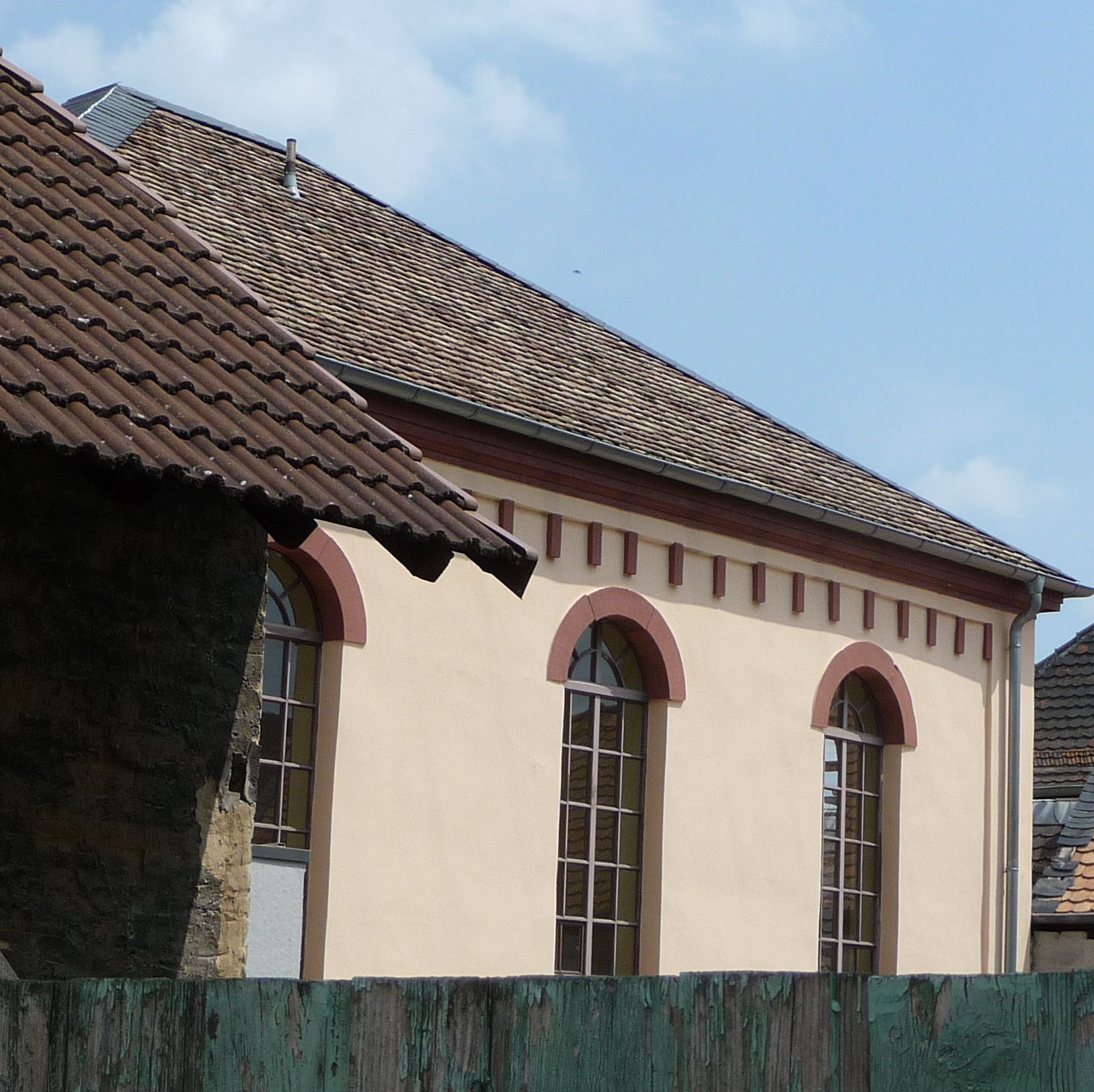 Synagoge